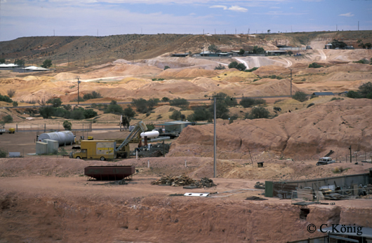 Coober Pedy, un vaste et perpétuel chantier de prospection d'opales